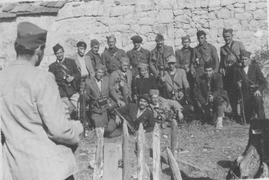 Un gruppo di partigiani della Quinta brigata montenegrina nel 1942